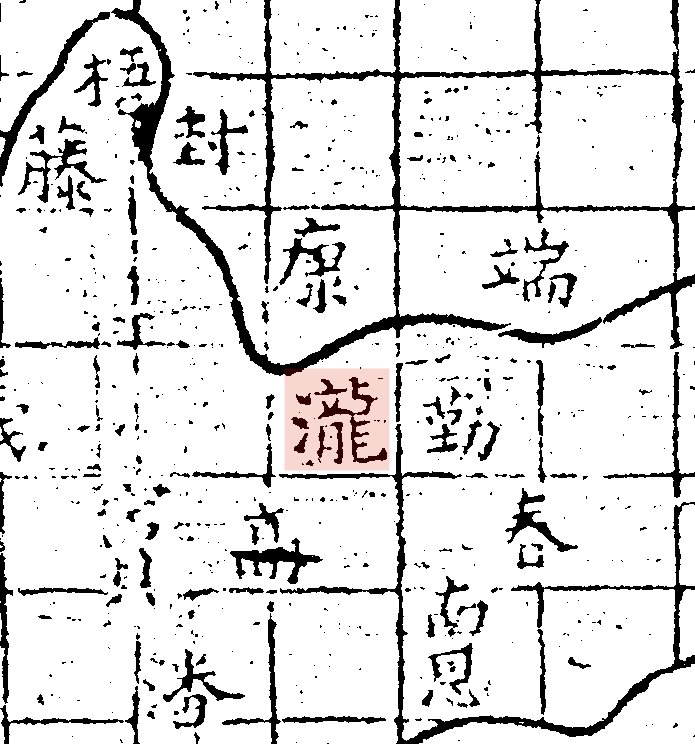 粵語: 禹跡圖中嘅瀧州